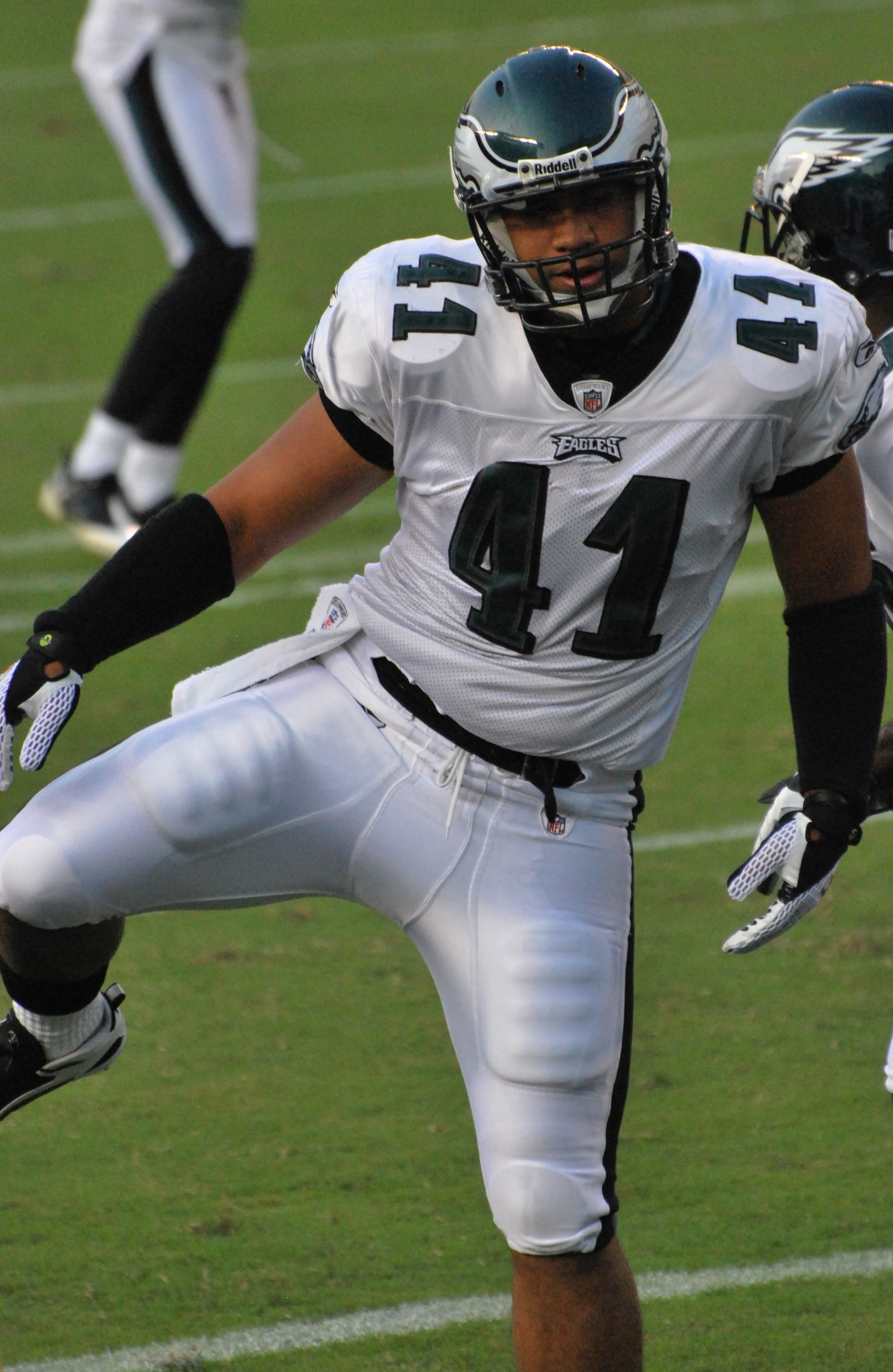 Marcus Mailei in August 2009